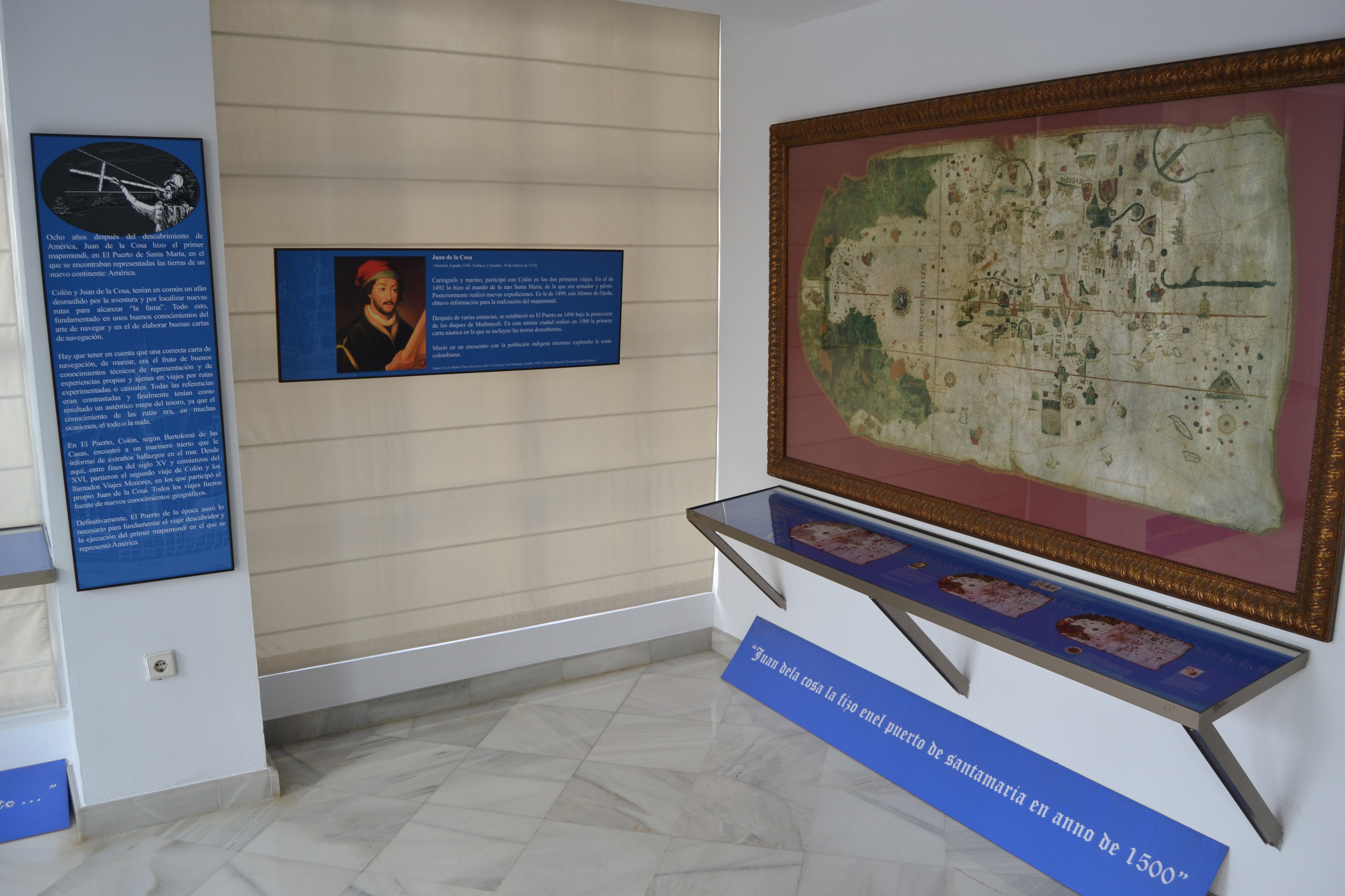 Centro Cultural Municipal Alfonso X El Sabio, El Puerto de Santa María, Andalucía, España